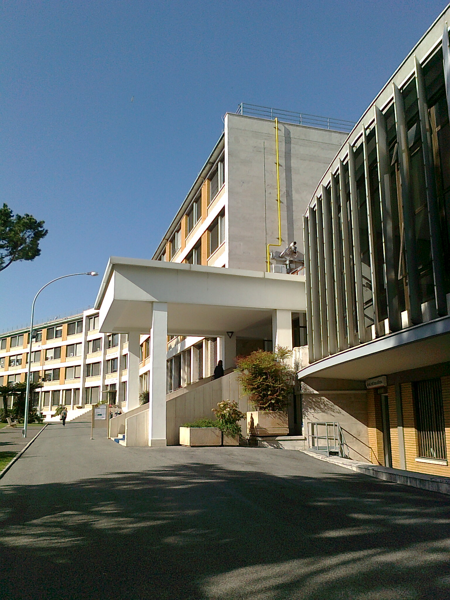 Auditorium, Policlinico Gemelli